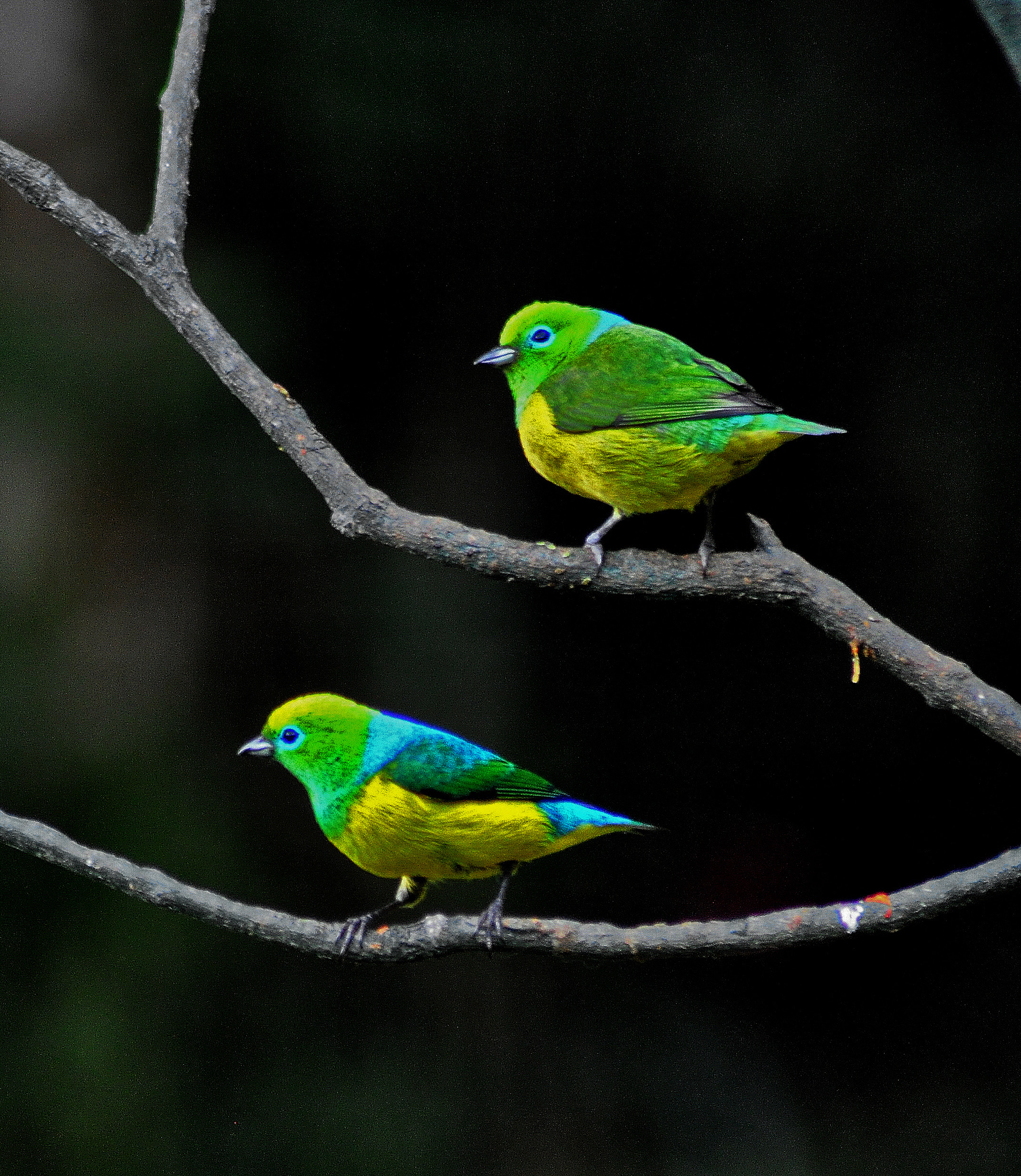 Casal adulto.